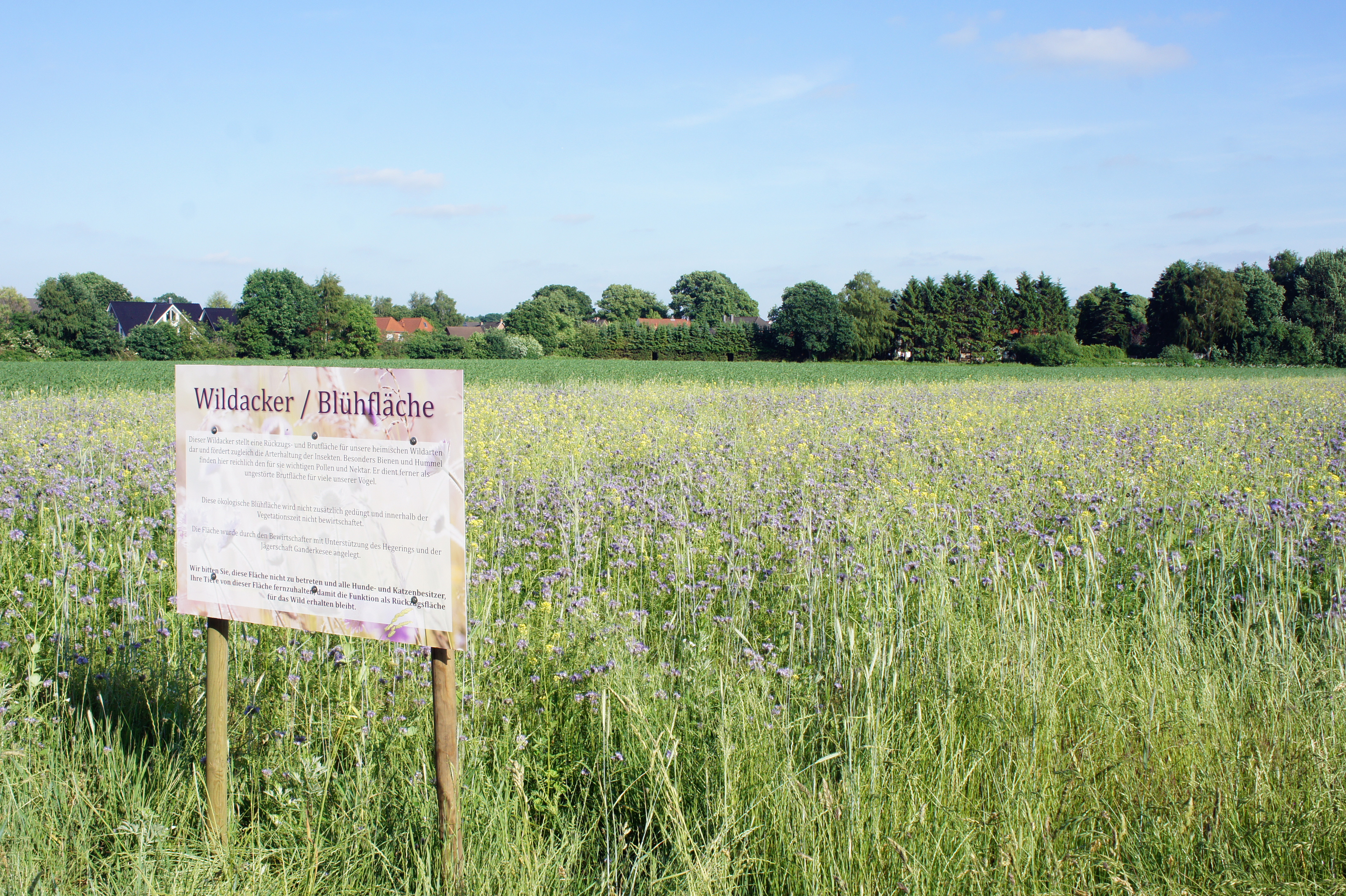 Wildacker / Blühfläche in Ganderkesee im Landkreis Oldenburg